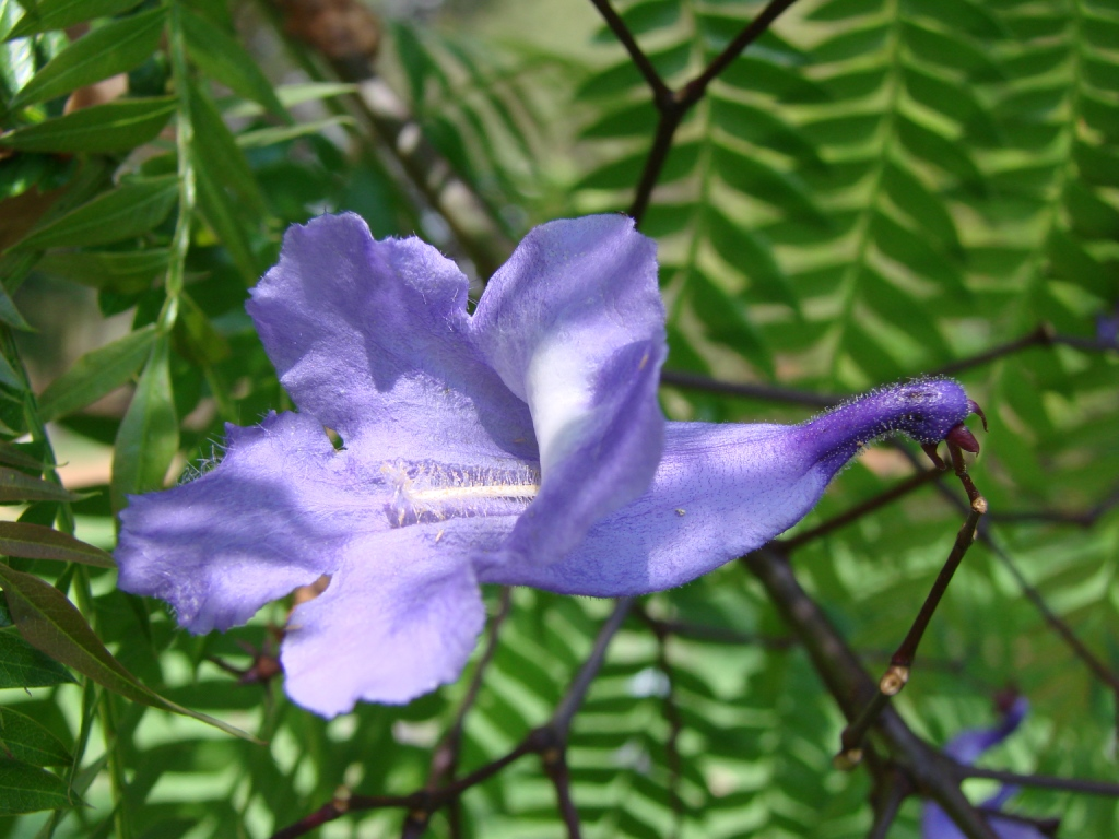 Jacaranda cuspidifolia (= Jacaranda chapadensis) - BIGNONIACEAE Jardim Botânico de Brasília - Distrito Federal - Brasil.